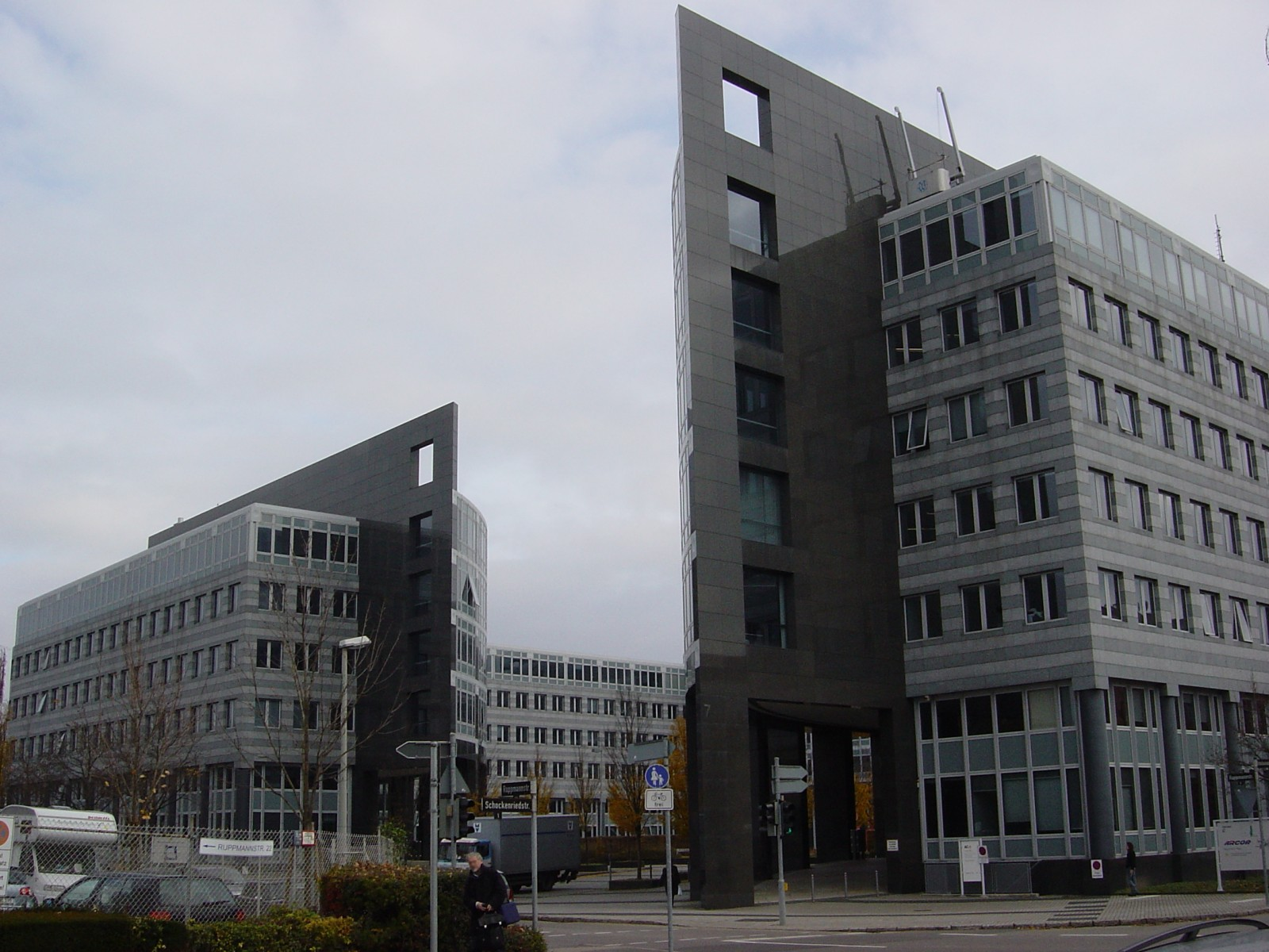 Regierungspräsidium Stuttgart, Ruppmannstraße 21 (Ecke Schockenriedstraße) in Stuttgart-Vaihingen